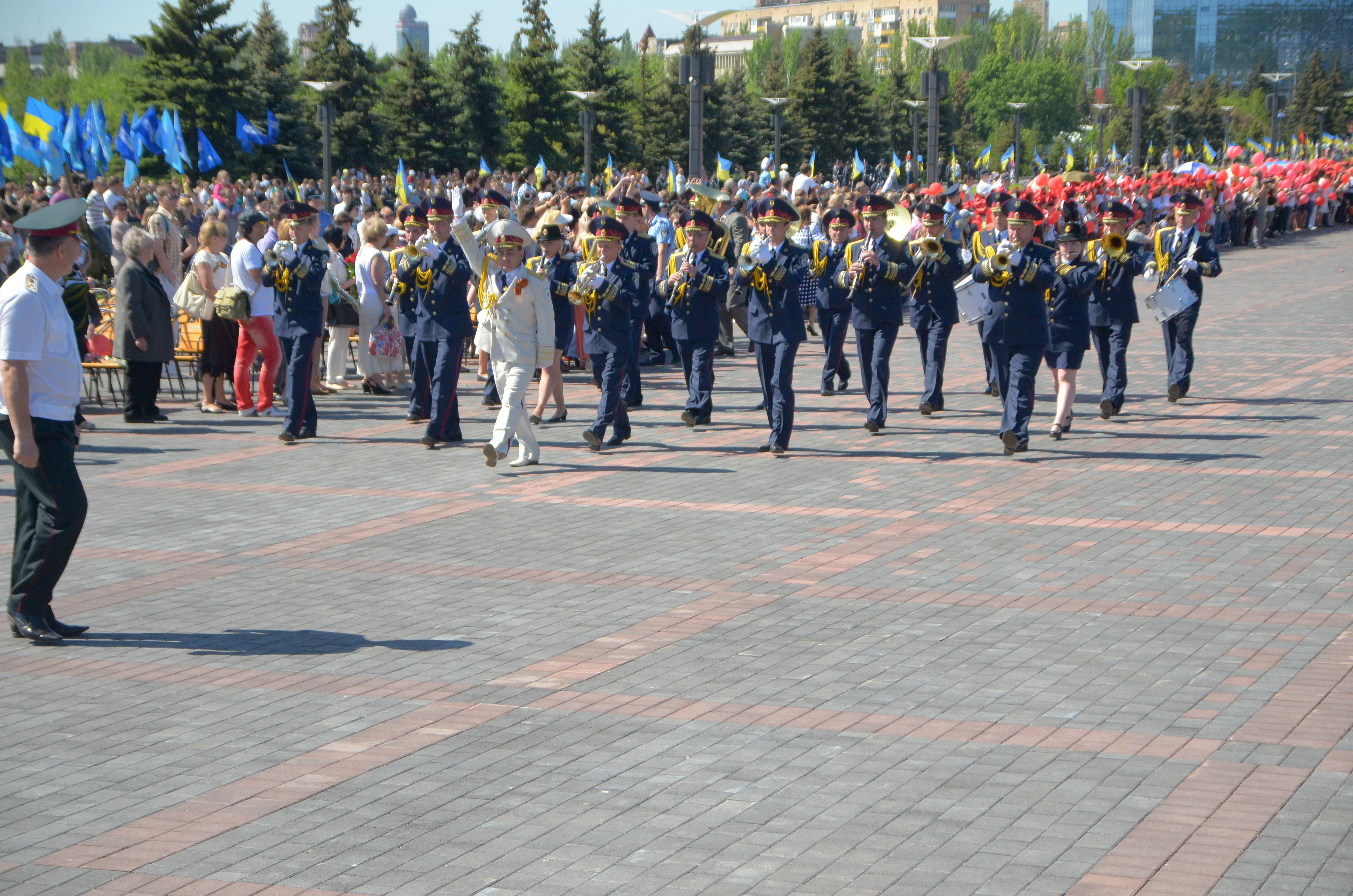 День Победы в Донецке